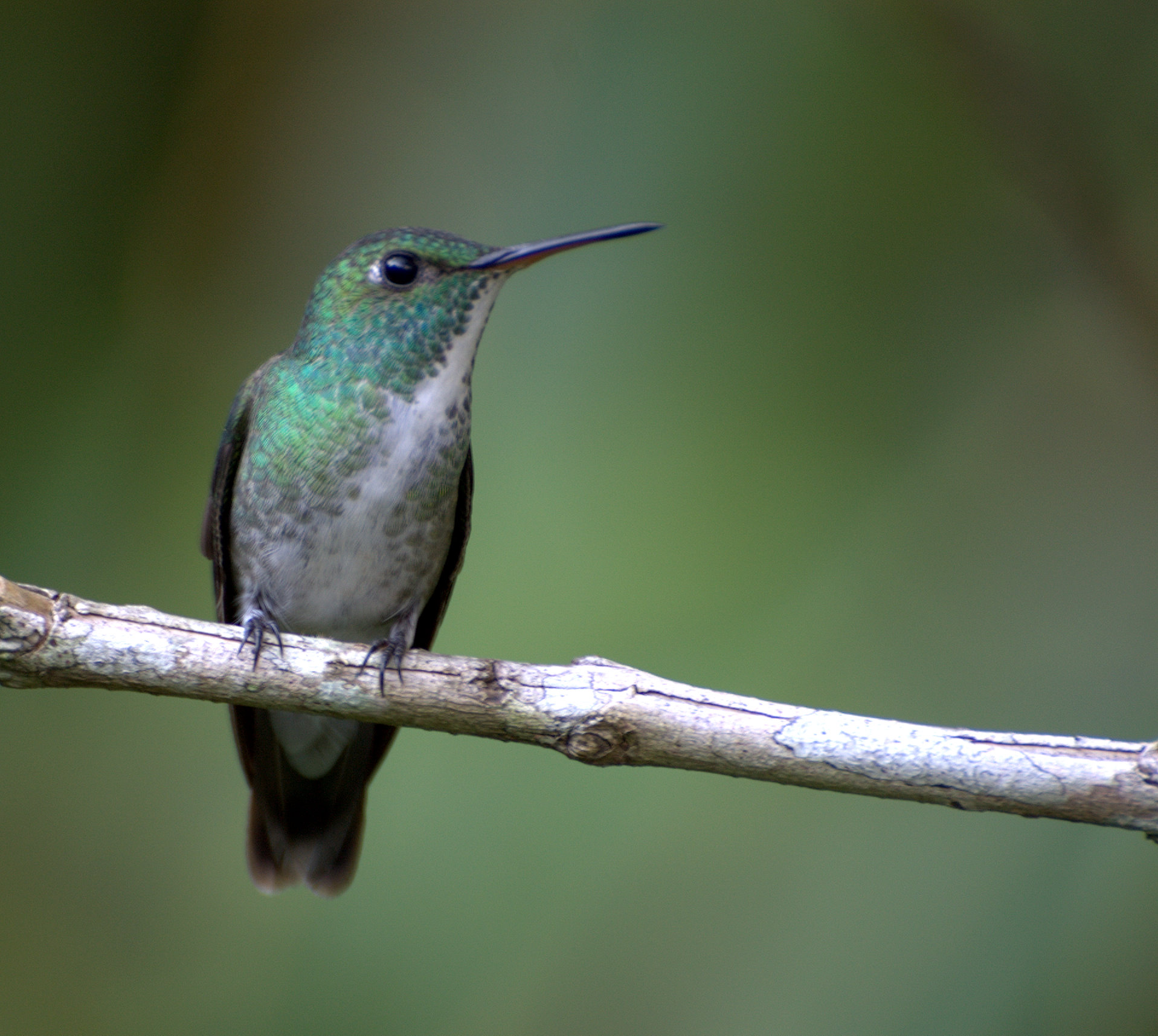 Amazilia versicolor (coastal nominate), from Chácara Antonio Wuo, Mogi das Cruzes-SP (Brazil)